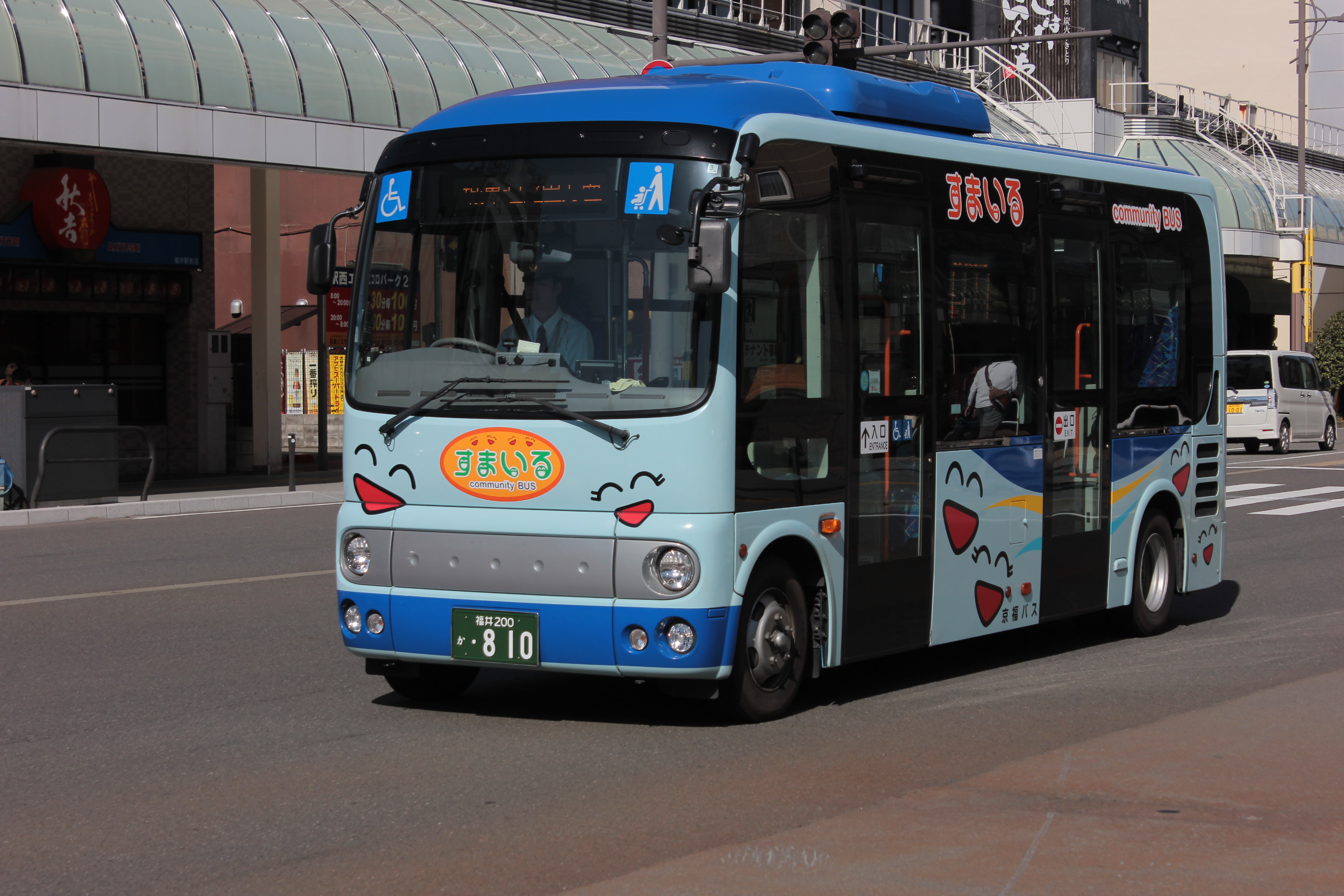 福井県福井市のコミュニティバス「すまいる」（東ルート） Canon EOS Kiss X5